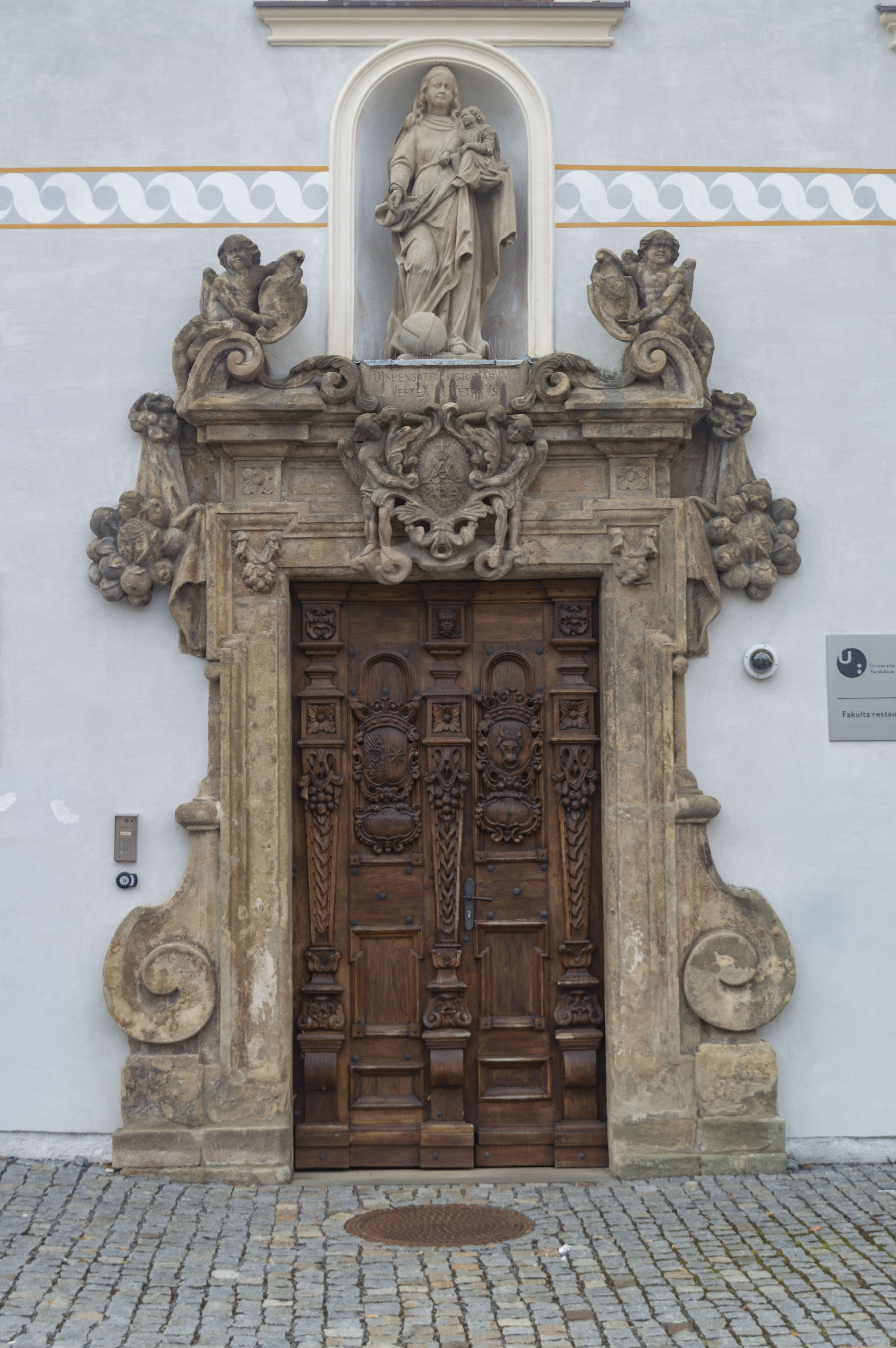 Piaristická kolej (Litomyšl) - portál